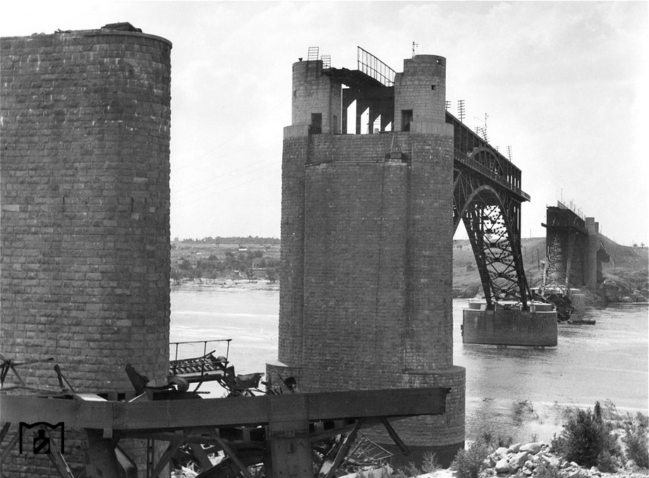 Разрушенный мост Стрелецкого через р. Новый Днепр на остров Хортица (Запорожье), 1942 год